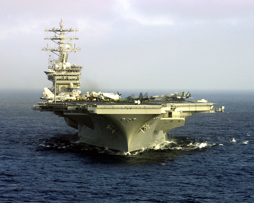 Flugzeugträger USS Nimitz (CVN-68) der United States Navy. Frontalansicht auf hoher See. Flugzeuge auf dem Flugdeck.